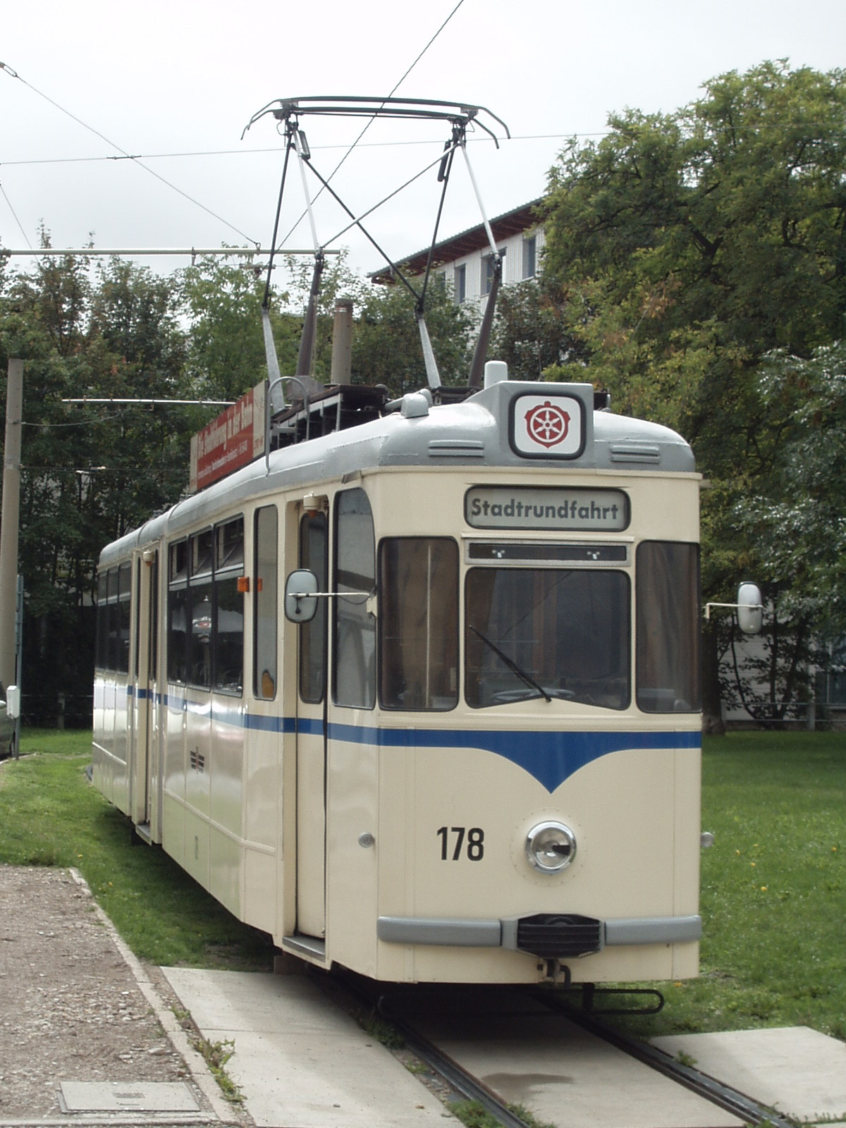 Historischer Straßenbahntriebwagen vom Typ Gotha G4-65 der Erfurter Verkehrs-AG